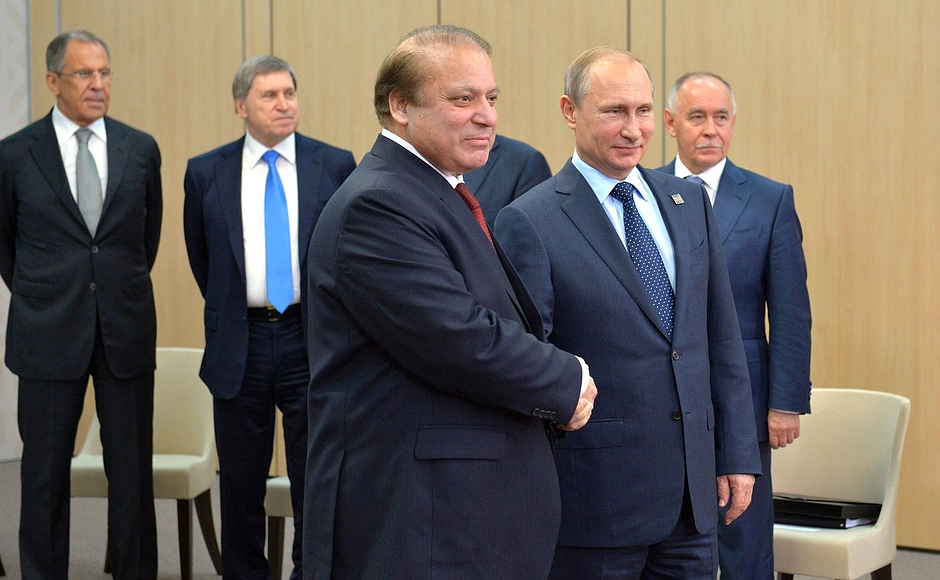 Владимир Путин с Премьер-министром Пакистана Навазом Шарифом.